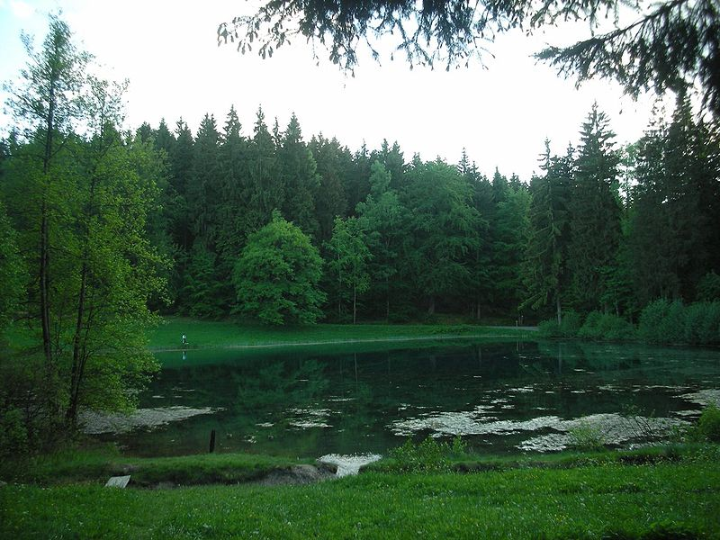 Hinterer Flossteich im Ortsteil Landesgemeinde in Erlbach (Vogtland)